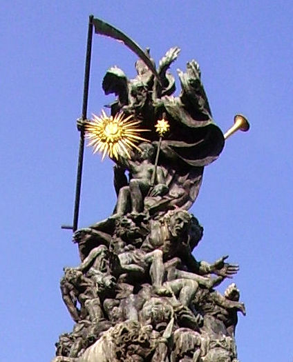 Spitze der Grupello-Pyramide auf dem Paradeplatz in Mannheim, mit Szepter und Strahlenkranz die Veritas.